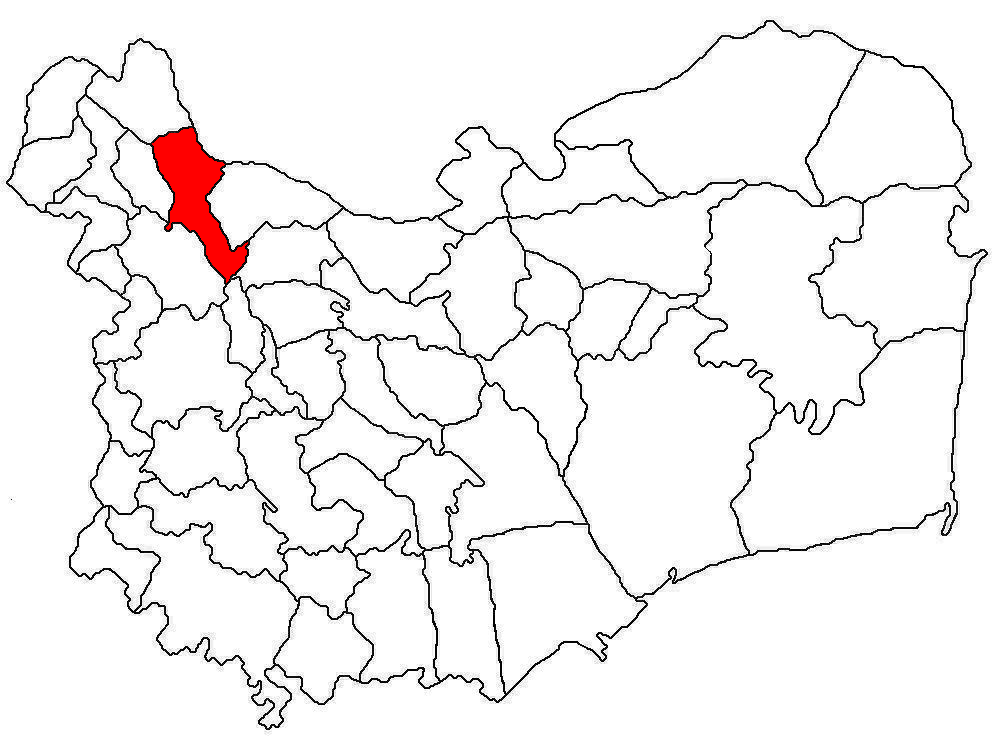 Categorie:Hărţi ale judeţului Tulcea